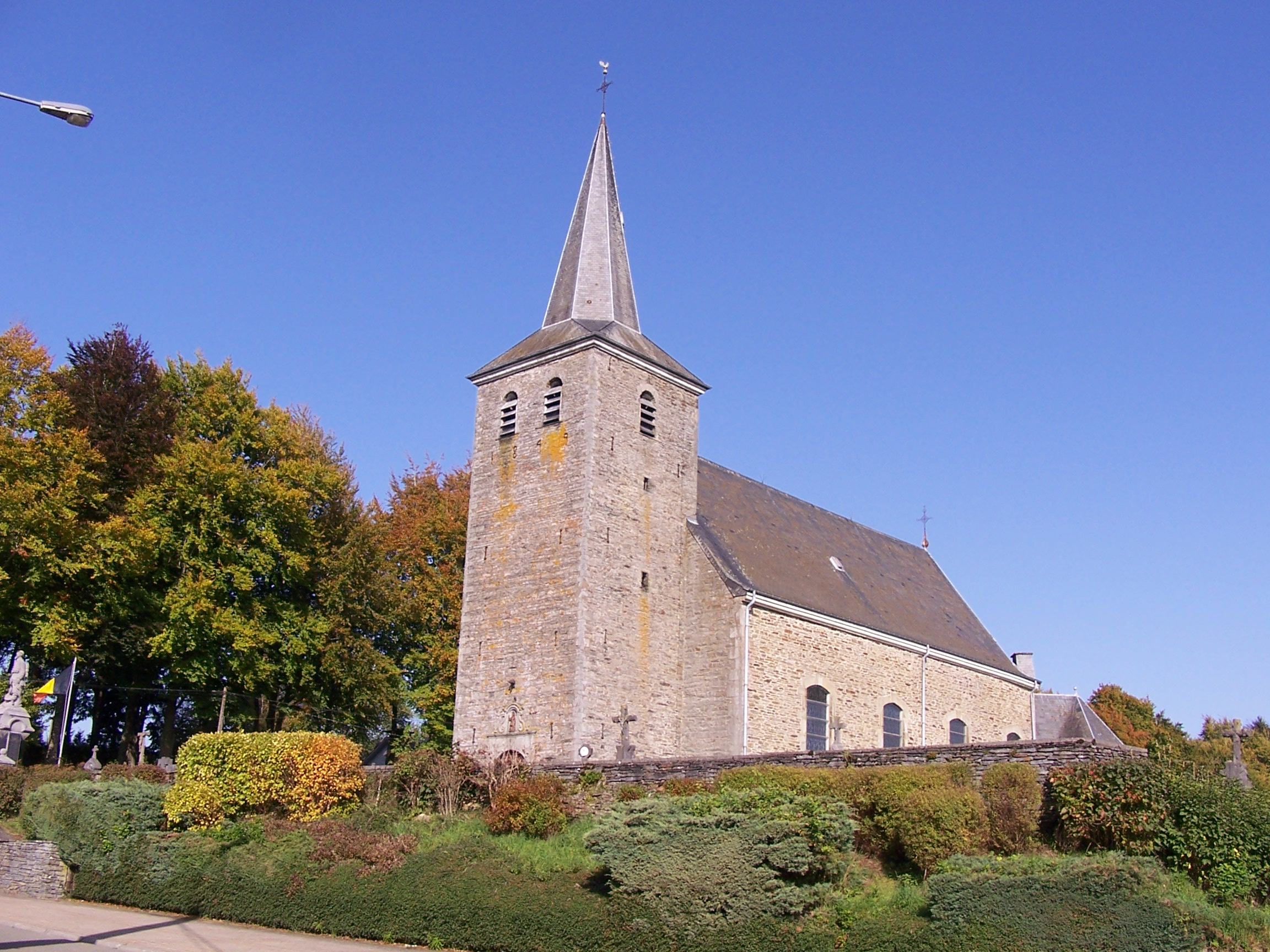 De kerk van Gouvy.